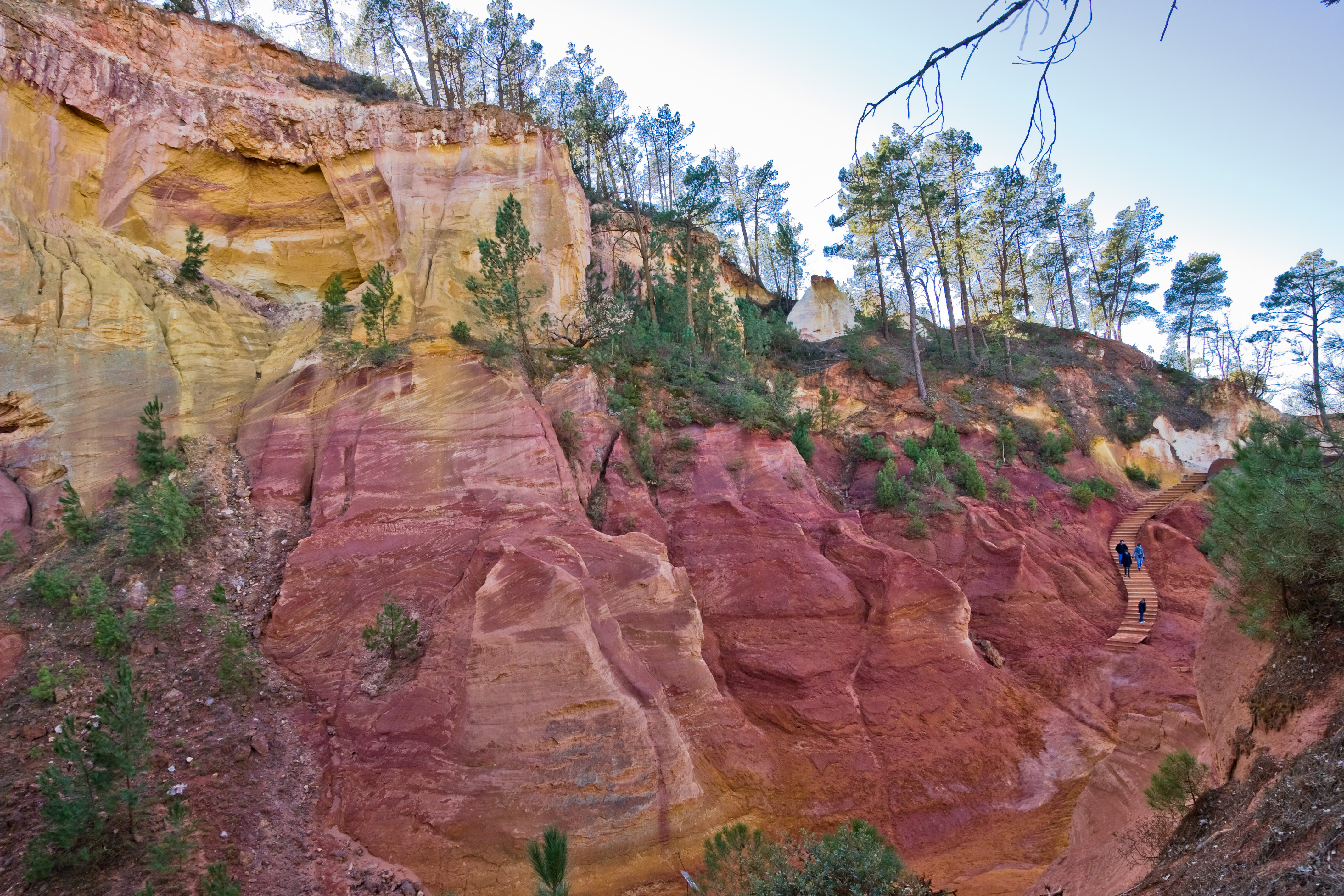 Chemin des Ocres, village de Roussilon dans le Vaucluse (France).